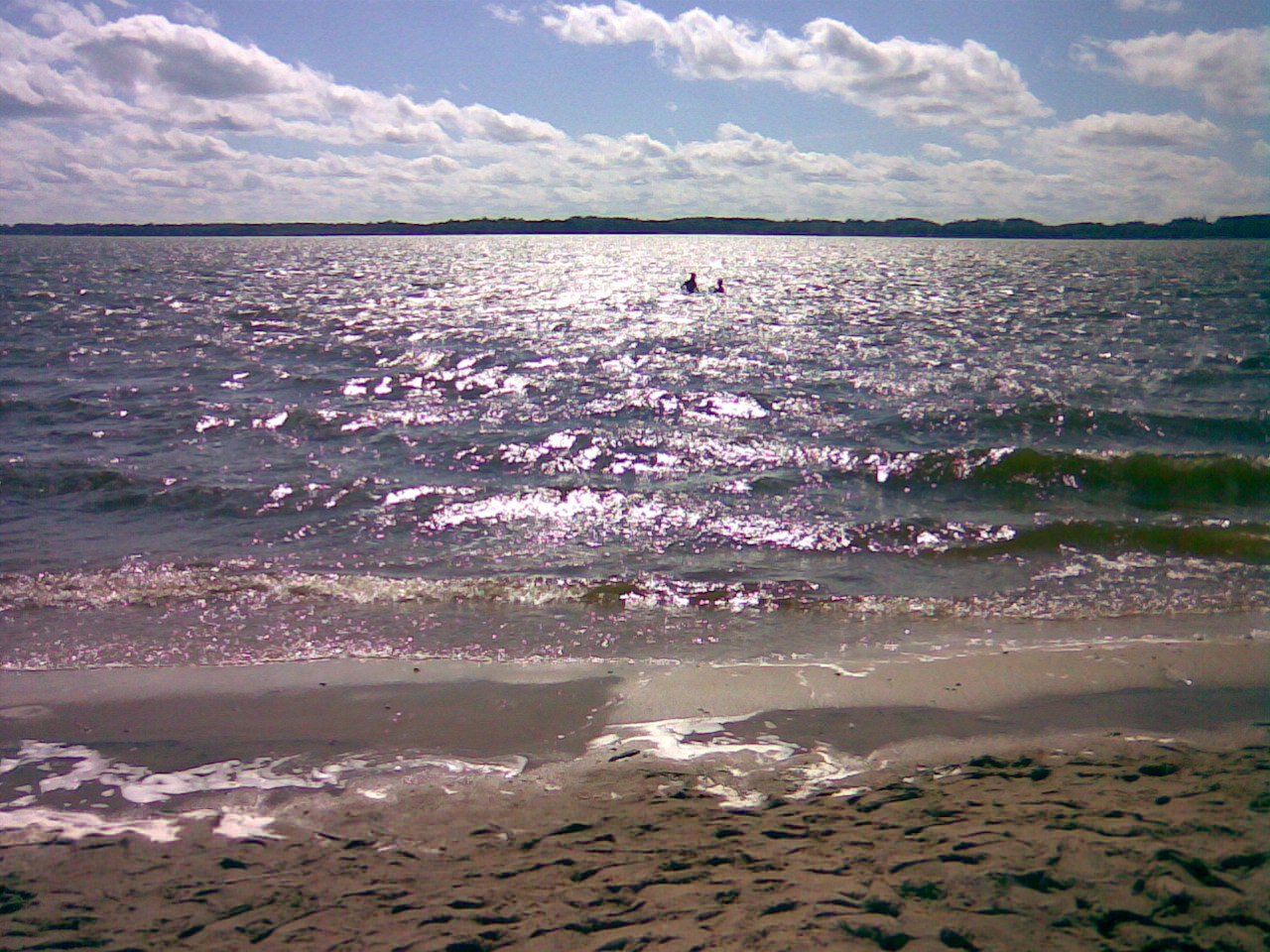 Žemaitėška: Loksta ežers